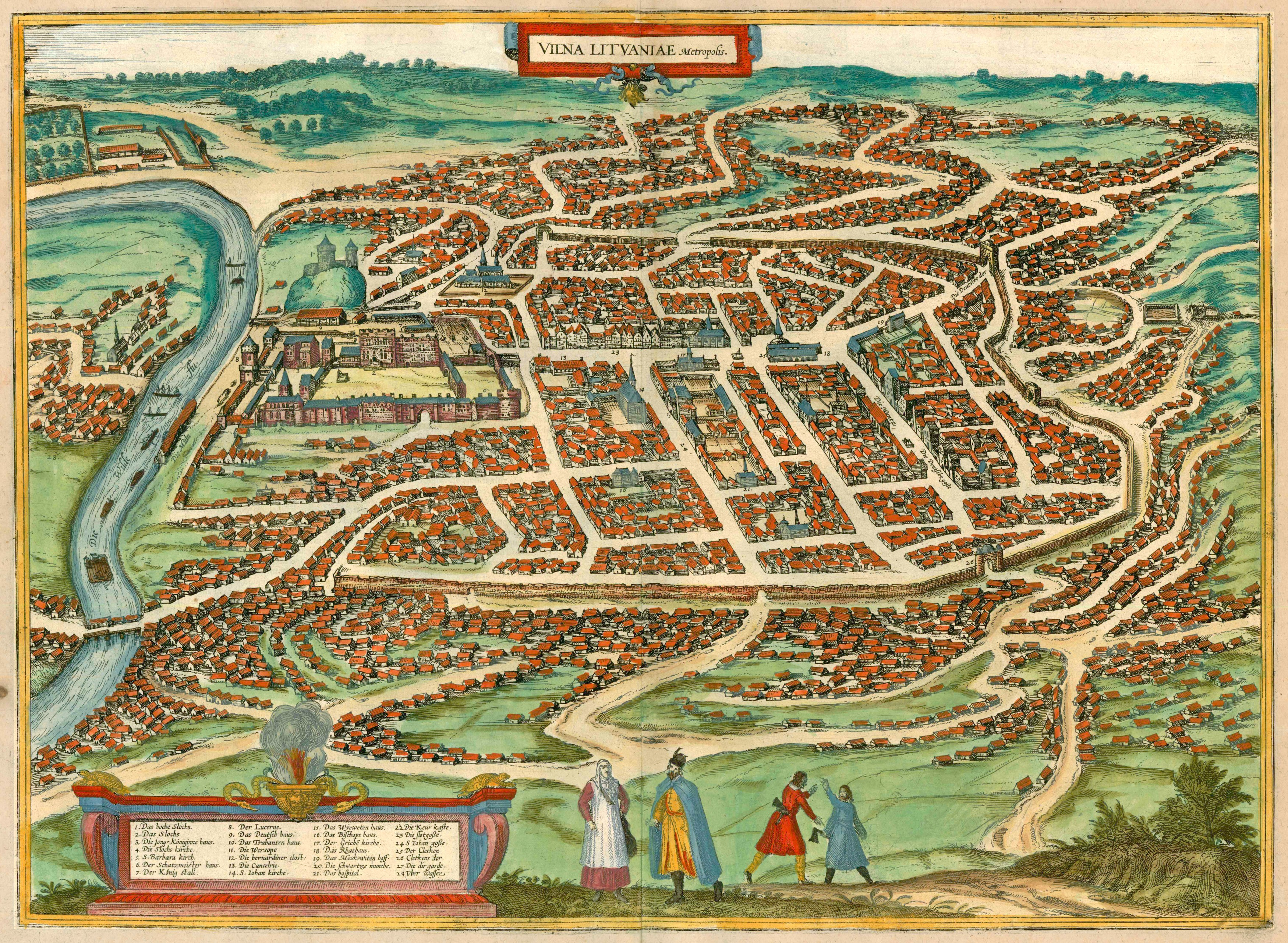 Беларуская (тарашкевіца): Вільня (Vilnia). Плян места (Vilna Lituaniae, Metropolis), з атлясу Гогенбэрга і Браўна.